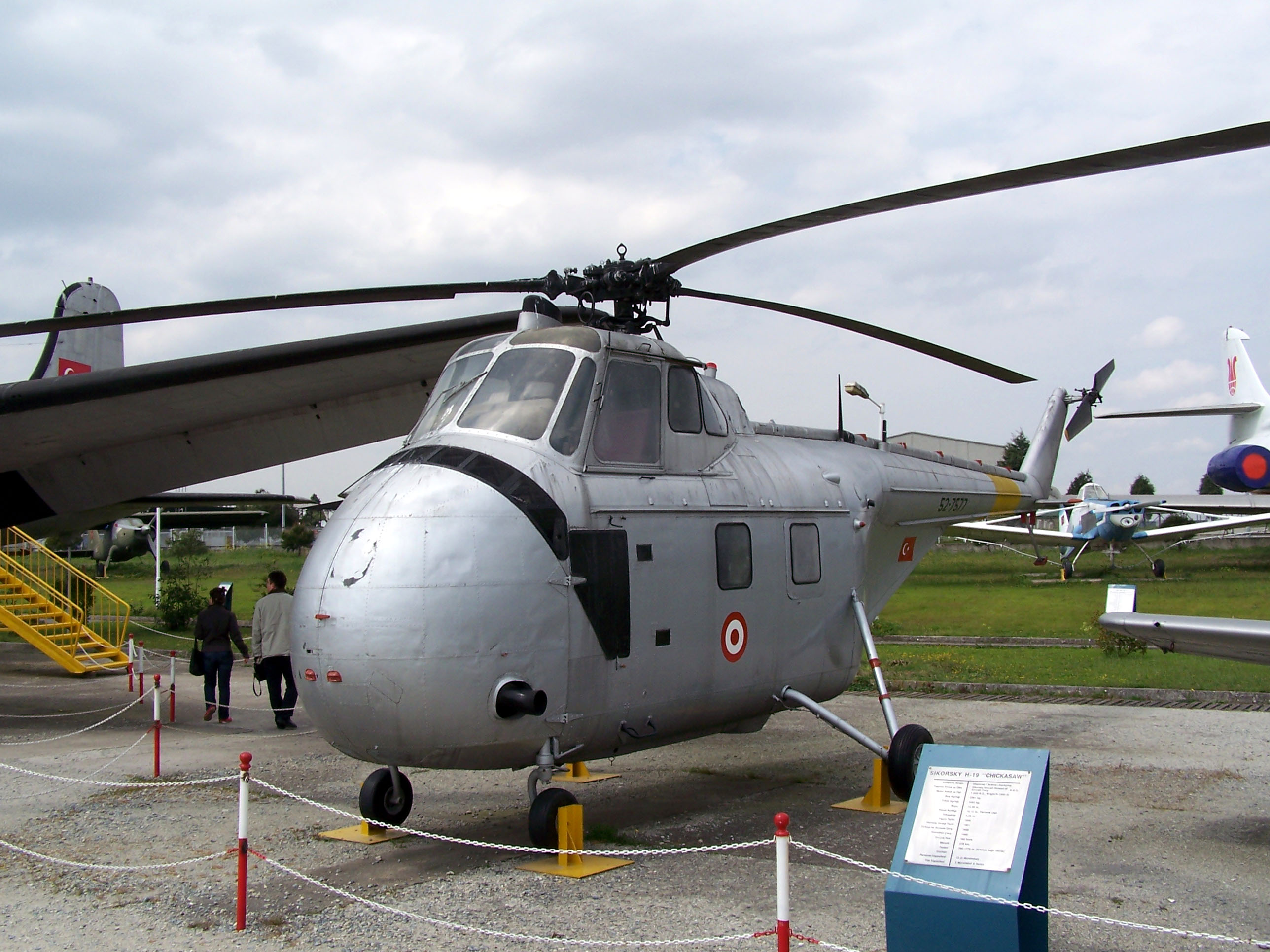 Sikorsky H-19 Chickasaw in Istanbul Aviation Museum (İstanbul Havacılık Müzesi), Istanbul, Turkey